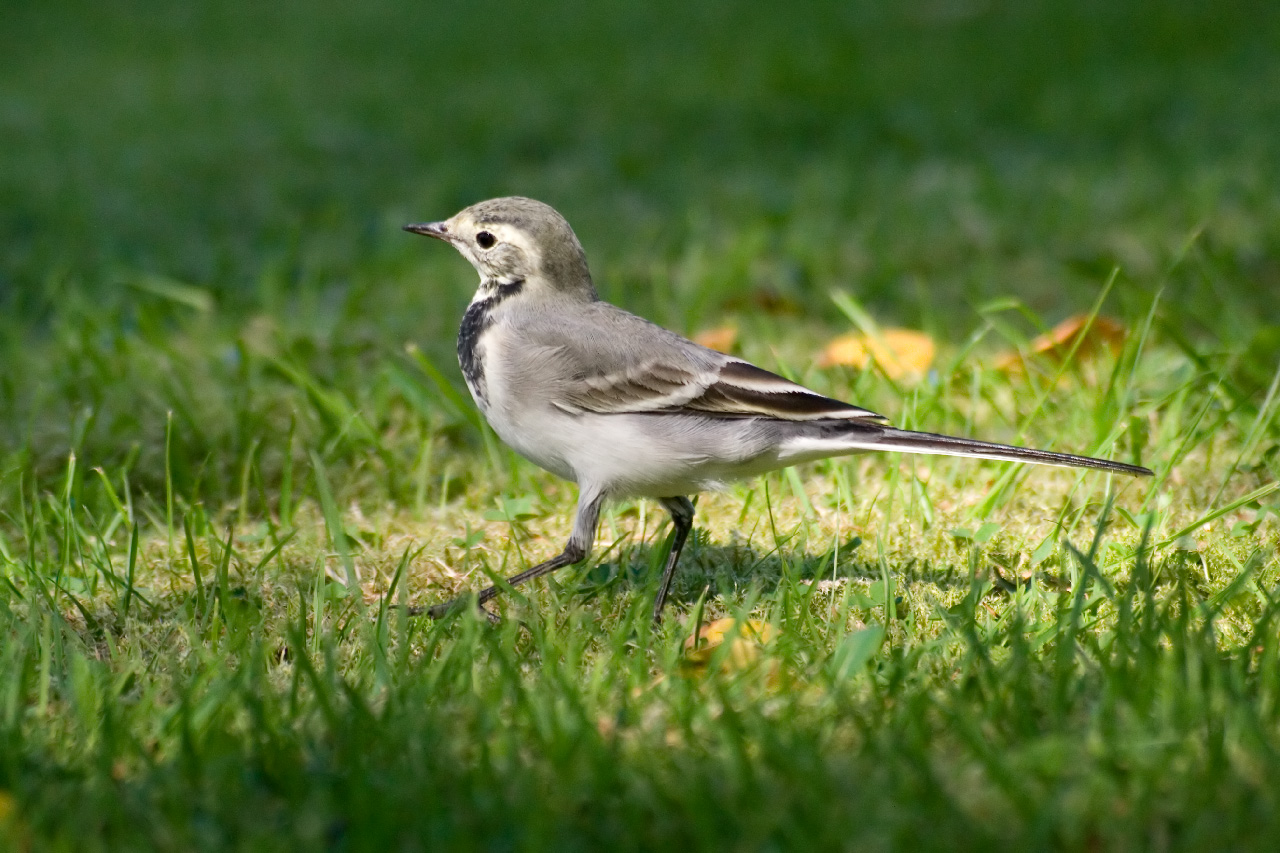 Sädesärla på gräsmatta